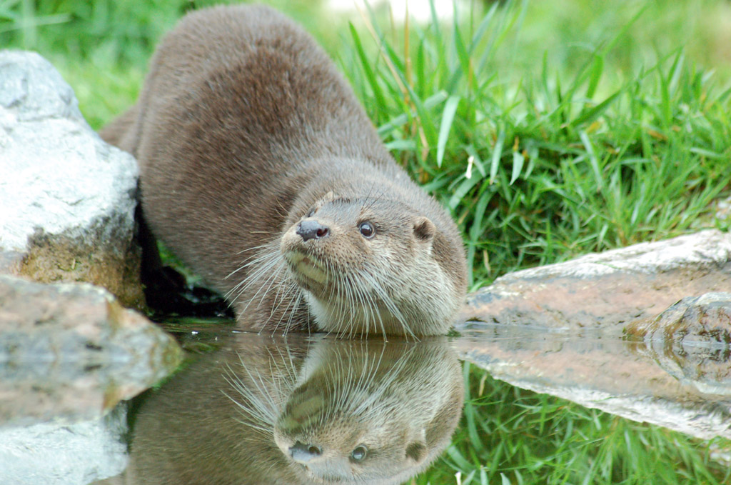 Loutre